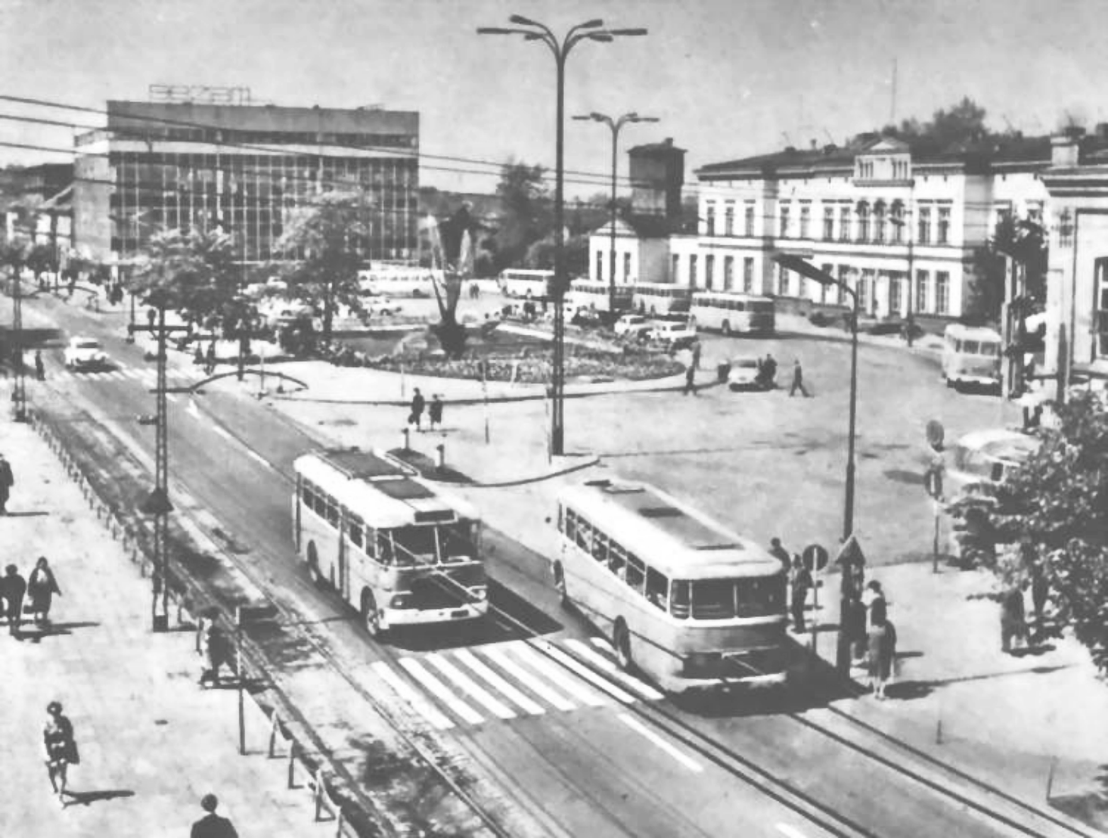 Sosnowiec widok na dworzec kolejowy Sosnowiec Główny. W miejscu dworca autobusowego dziś jest parking strzeżony, Sezam stoi nadal, lecz w zapomnieniu, a ulica (obecnie 3 Maja) dziś jest dwujezdniowa z torowiskiem tramwajowym pośrodku. Zdjęcie wykonane z obecnego Placu Stulecia przez nieznanego autora i nieznanej daty.